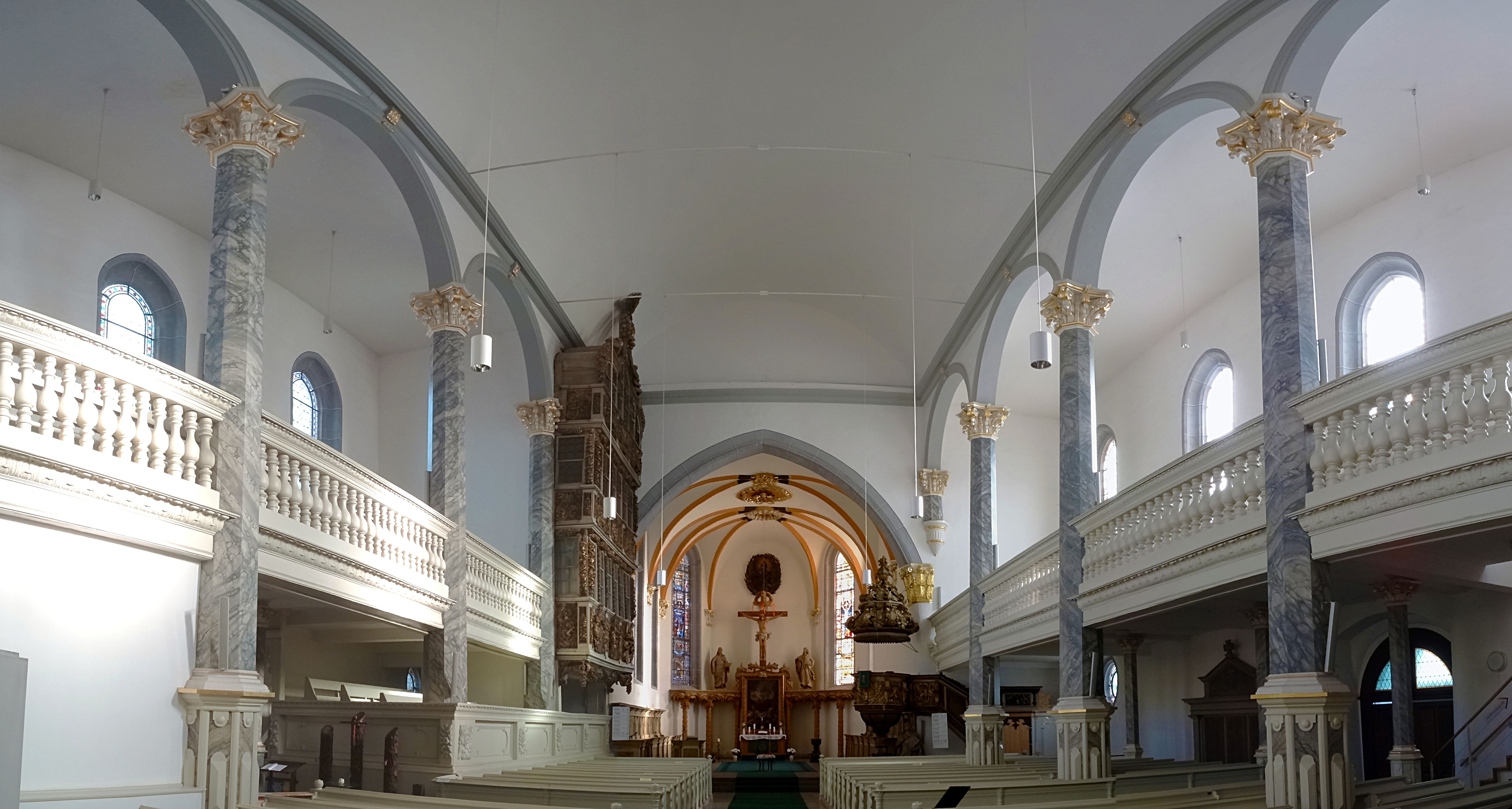 der dreischiffige Innenraum von St. Trinitatis Sondershausen